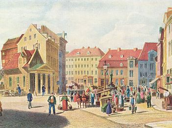 Fischmarkt Altona um 1860 mit Minervabrunnen